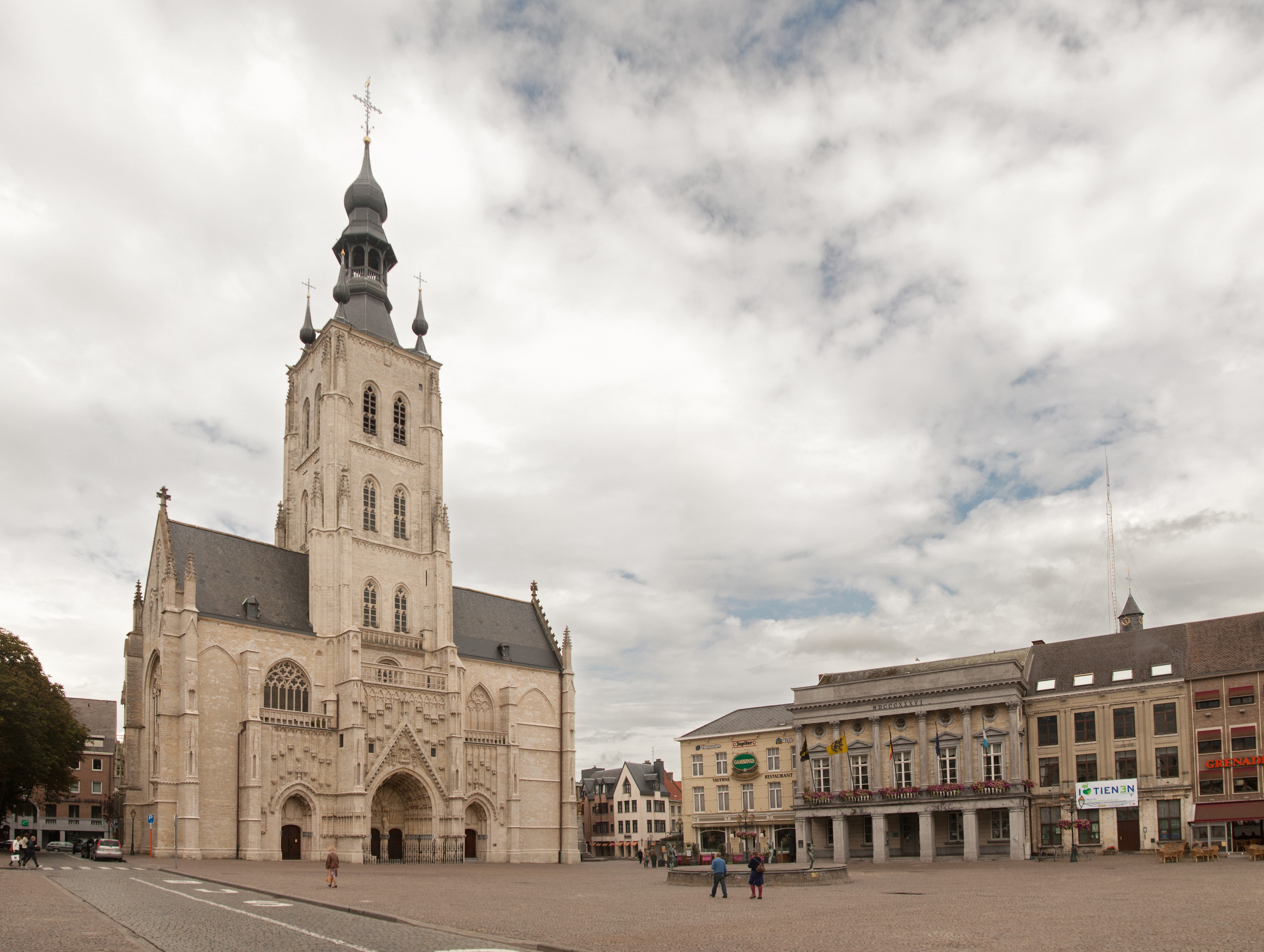 Zicht op de Onze-Lieve-Vrouw-ten-Poelkerk en het stadhuis in Tienen